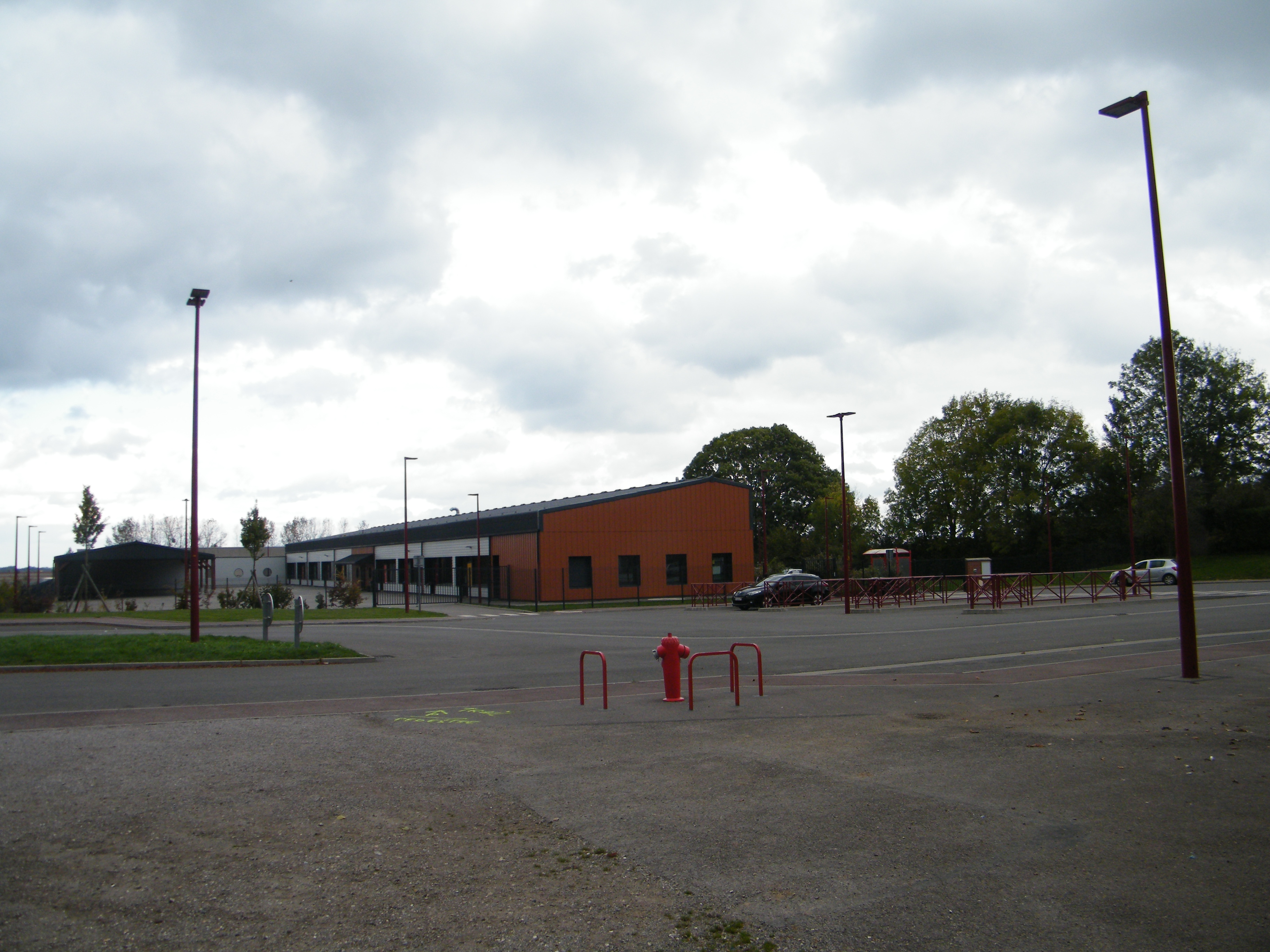 Oisemont, Somme, Fr, école primaire intercommunale des sentiers cachés (RPC).